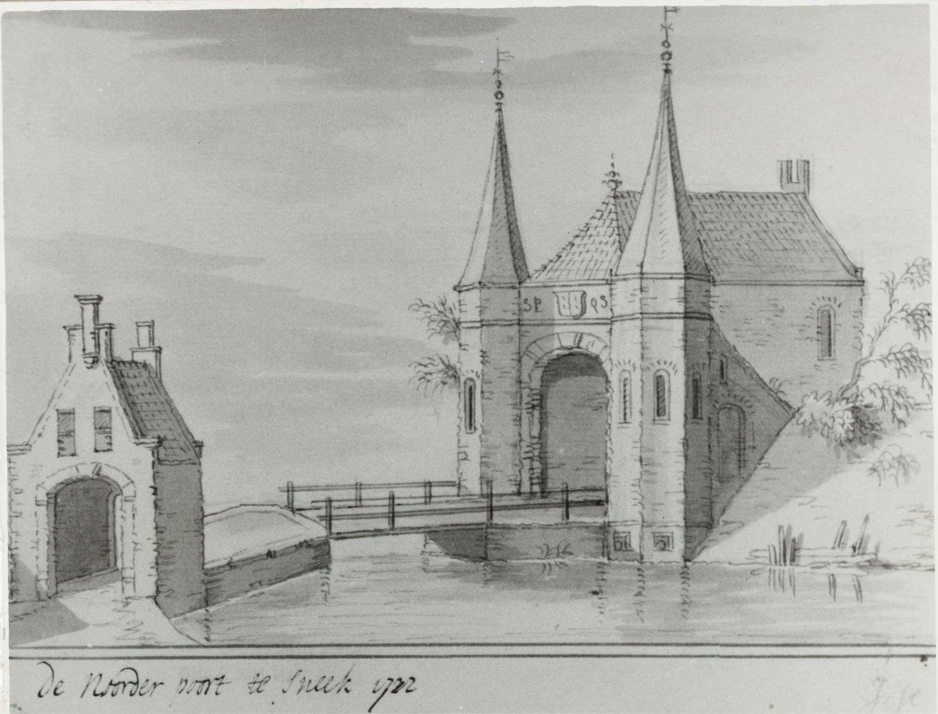 Voormalige Noorderpoort te Sneek in 1722.